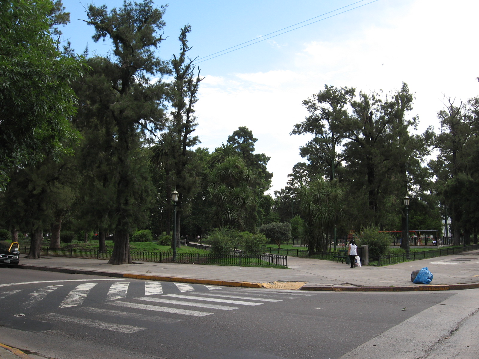 Plaza Arenales de la Ciudad de Buenos Aires. Yo mismo saqué la foto, libero todos los derechos y la pongo en el dominio público